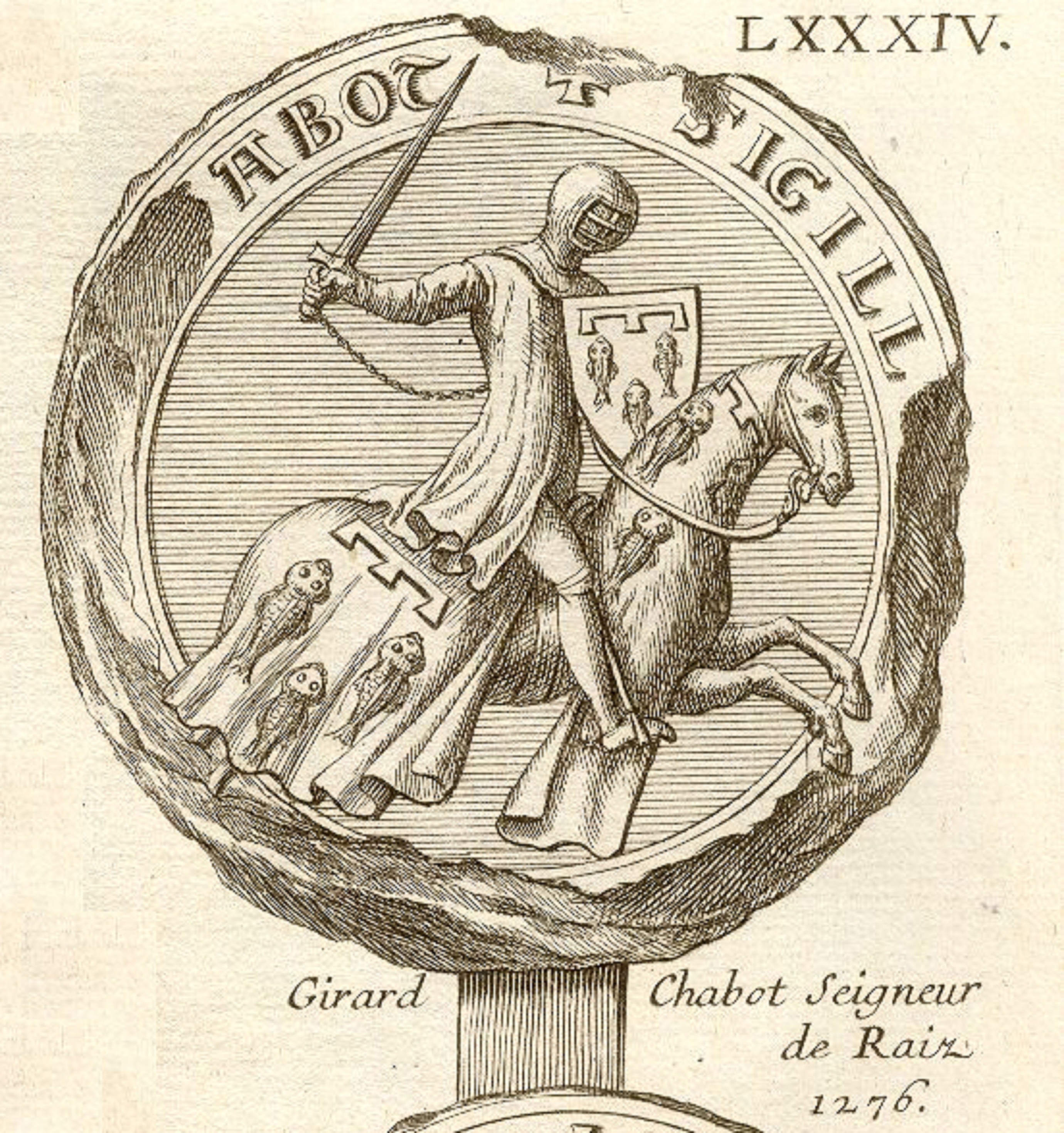 Sceau de Girard II Chabot, seigneur de Raiz Sceaux de Bretagne d’après Dom Morice, Mémoires pour servir de preuves à l’histoire ecclésiastique et civile de Bretagne (1742-1744), clichés Y.-A. Durelle-Marc.